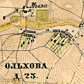 Деревня Ольхово на карте 1885 года.